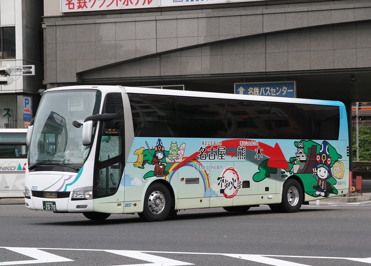 ・登録番号 名古屋200か20-70 ・社番：2802 ・名鉄バス㈱名古屋中央営業所所属 ・夜行高速路線用車両 ・2014年6月21日 名古屋市中区にて撮影 ・撮影者 Zondag2000